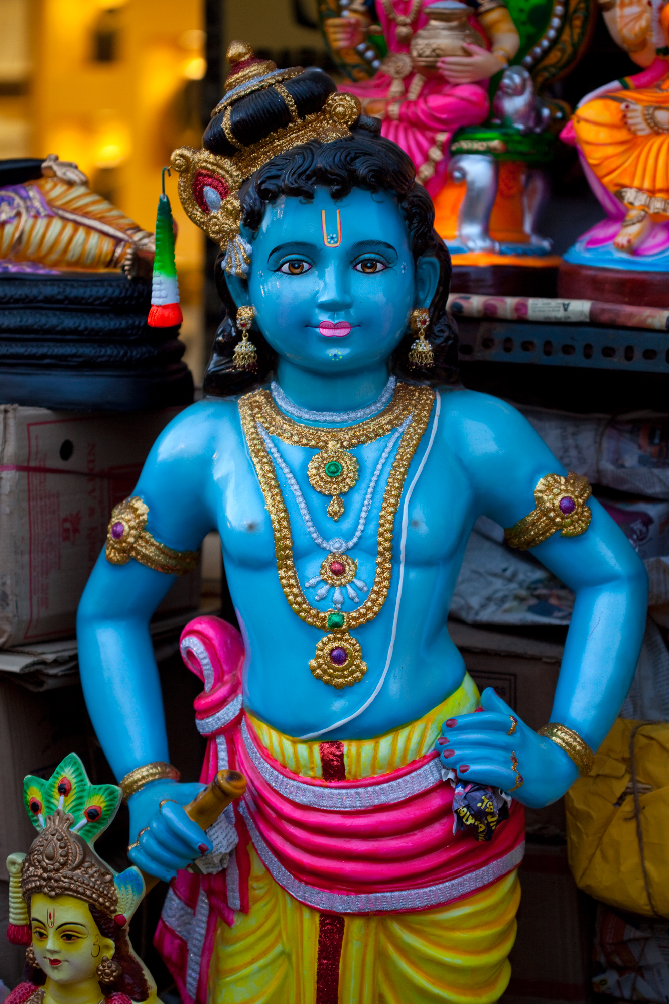 Krishna Golu dolls